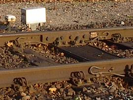 PSSSL-kastje te Raalte, eigen foto